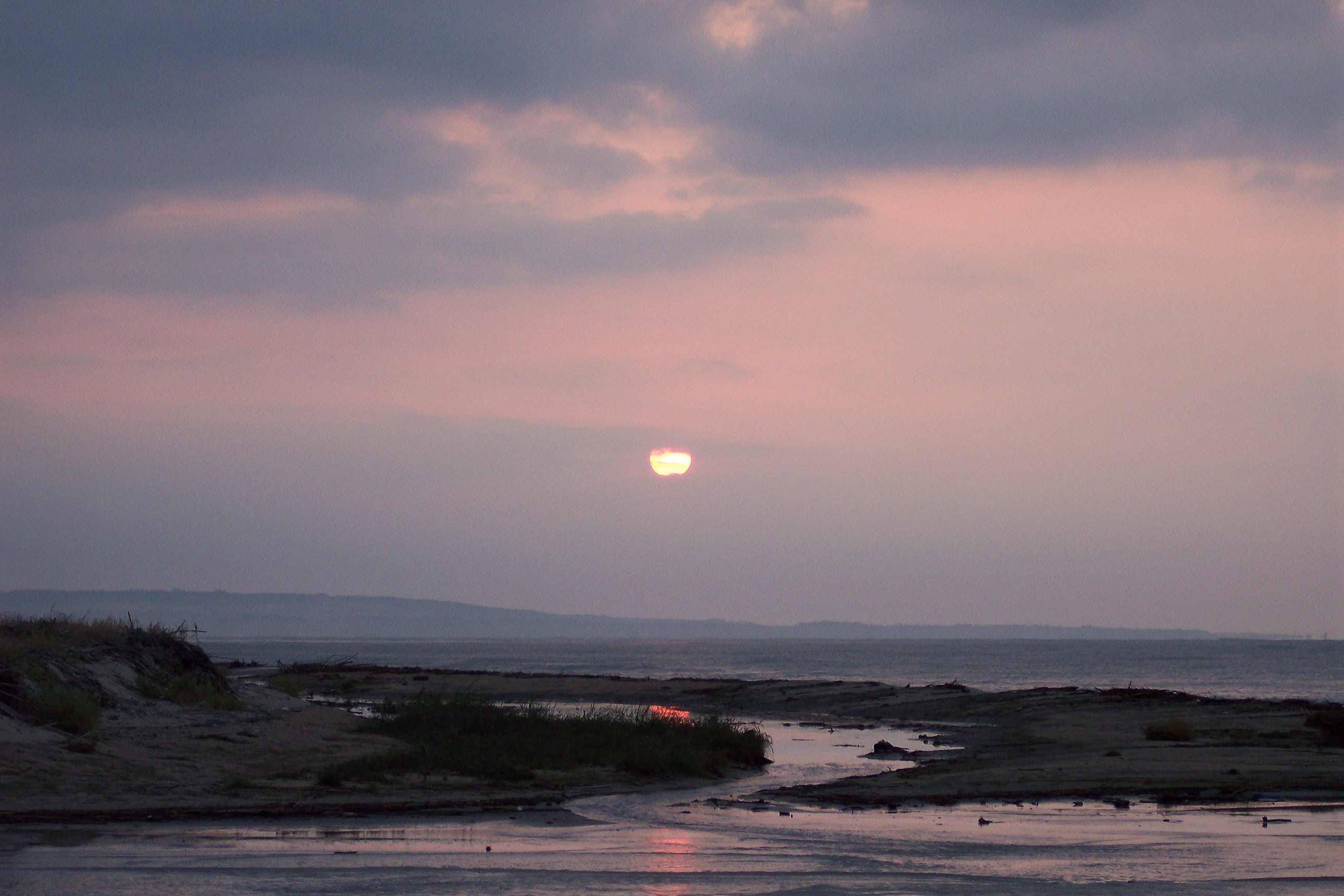 Alba sulla spiaggia di Cropani Marina (CZ)